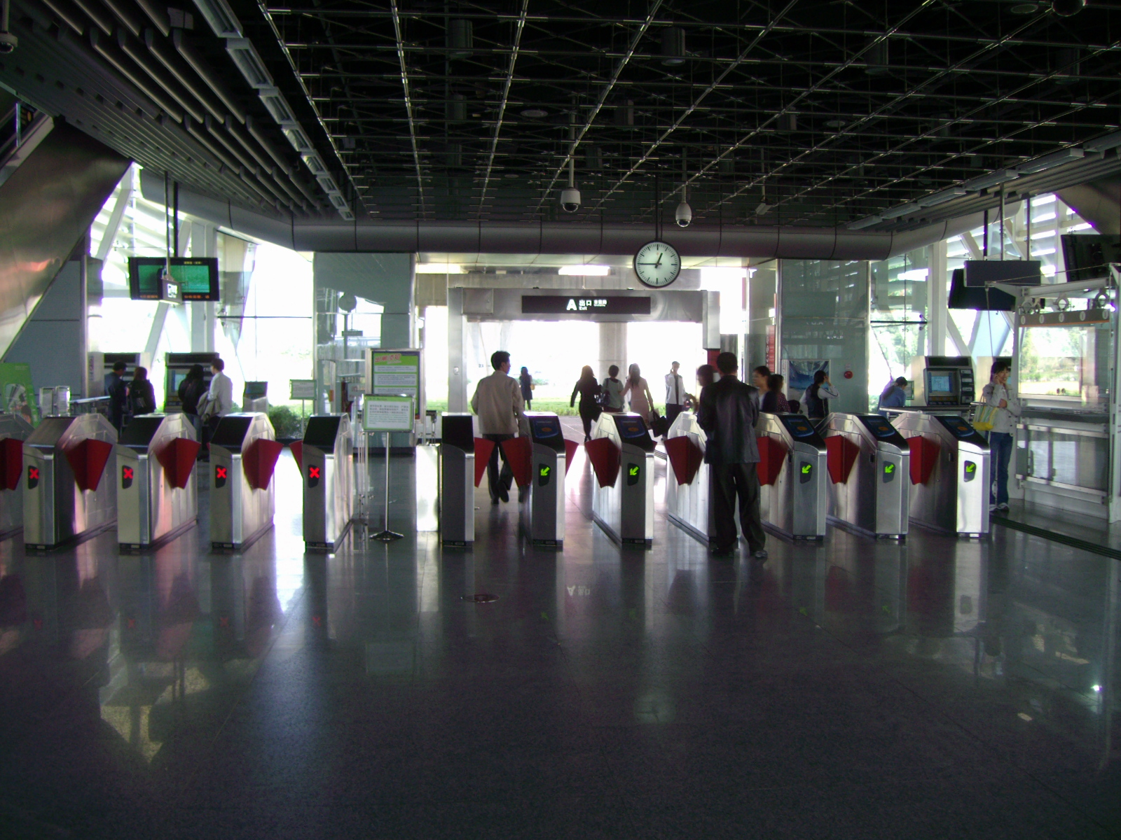 广州地铁石碁站的闸门